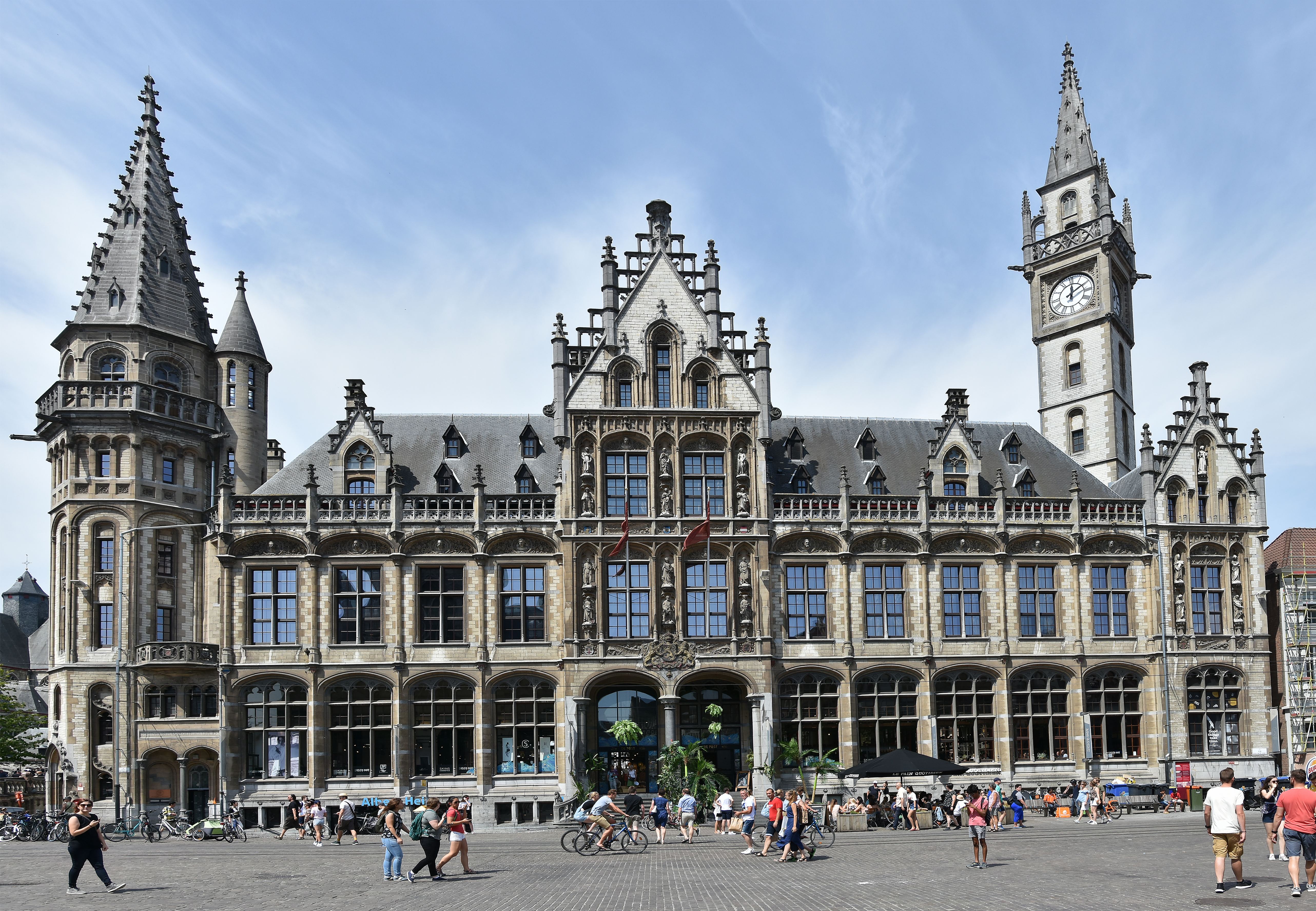 Oud Postkantoor (Gent) 30-06-2019 12-10-56 This photo of immovable heritage has been taken in the Flemish Region